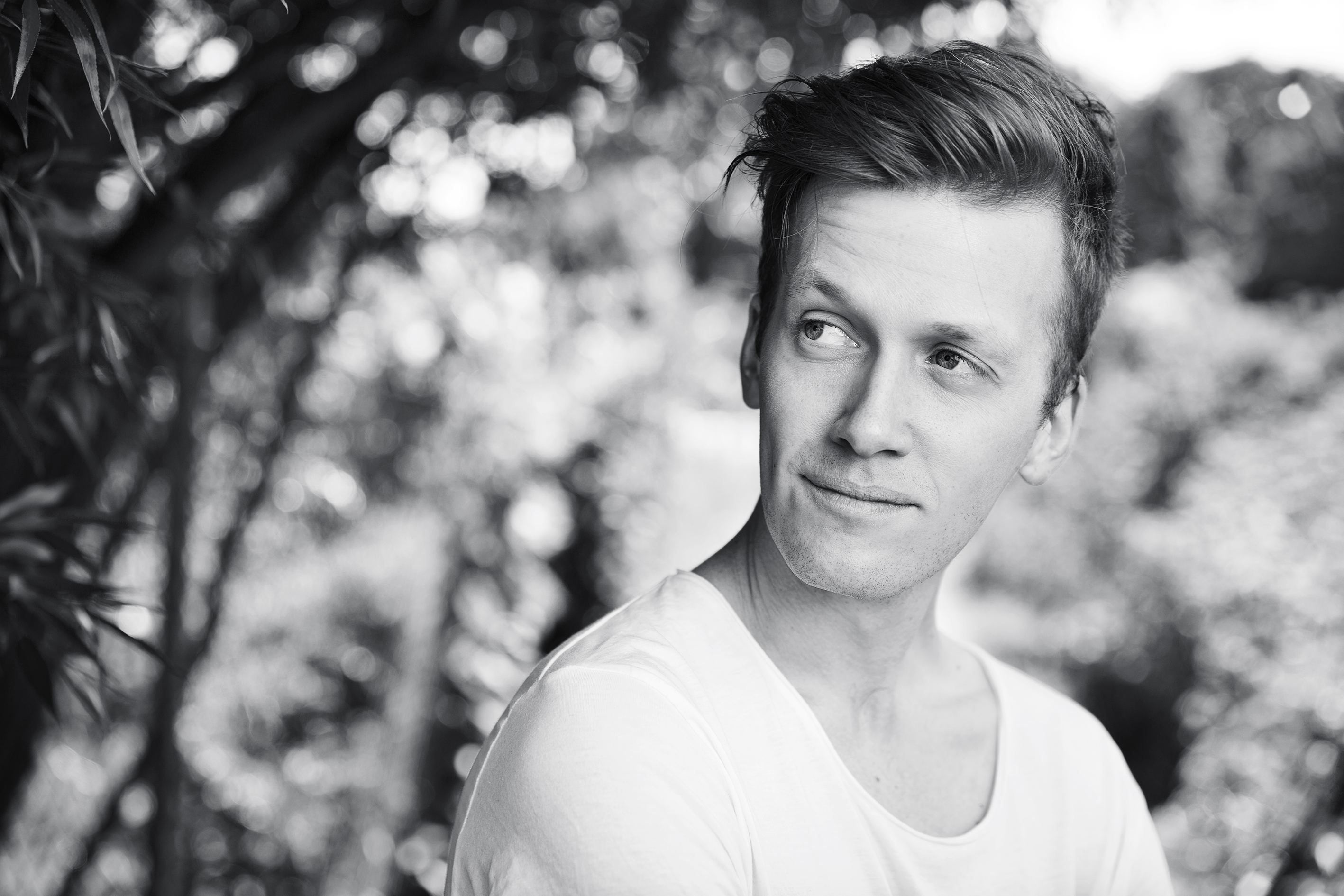 Foto: Ingvil Skeie Ljones